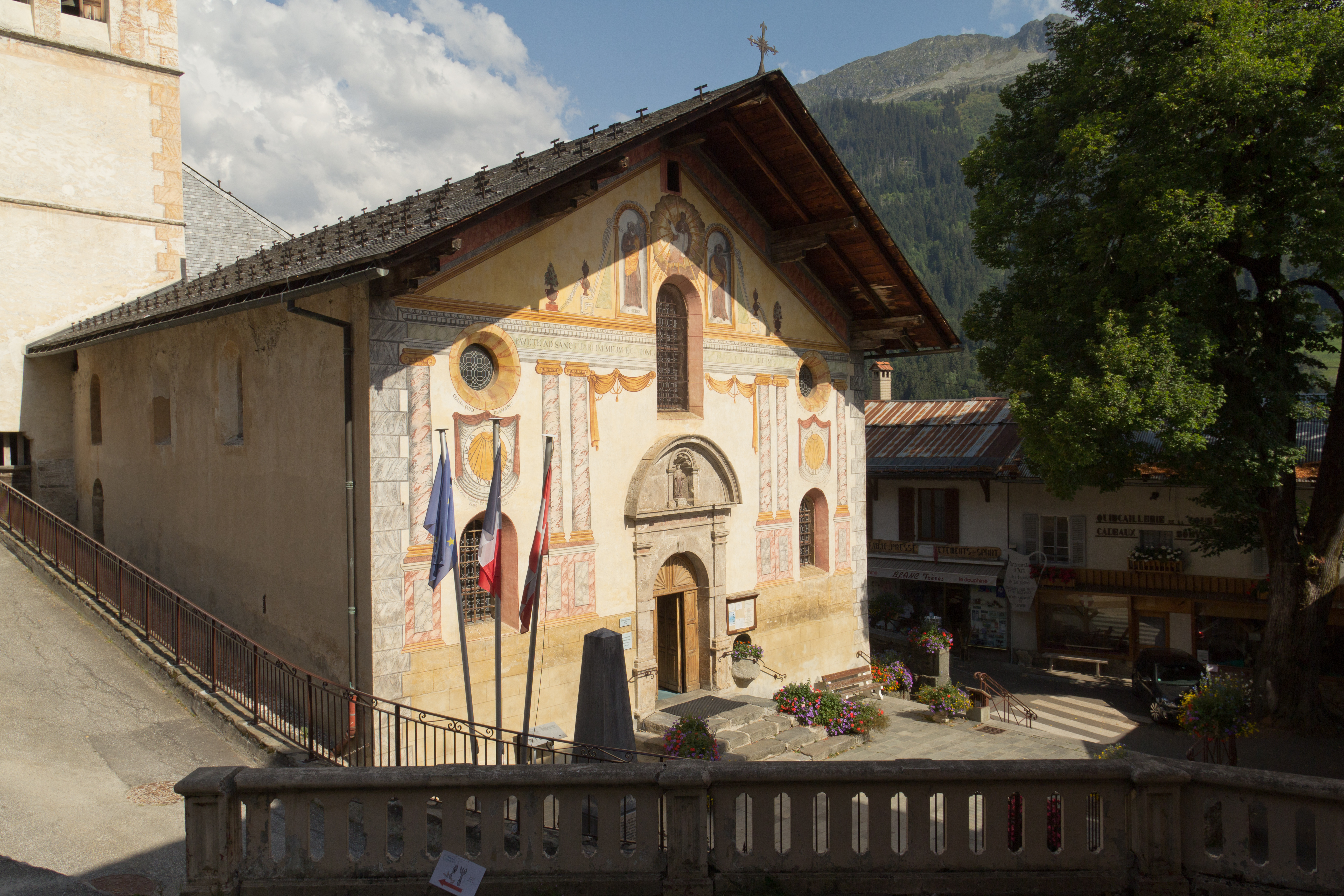 Un monument aux morts se trouve au nord du parvis.